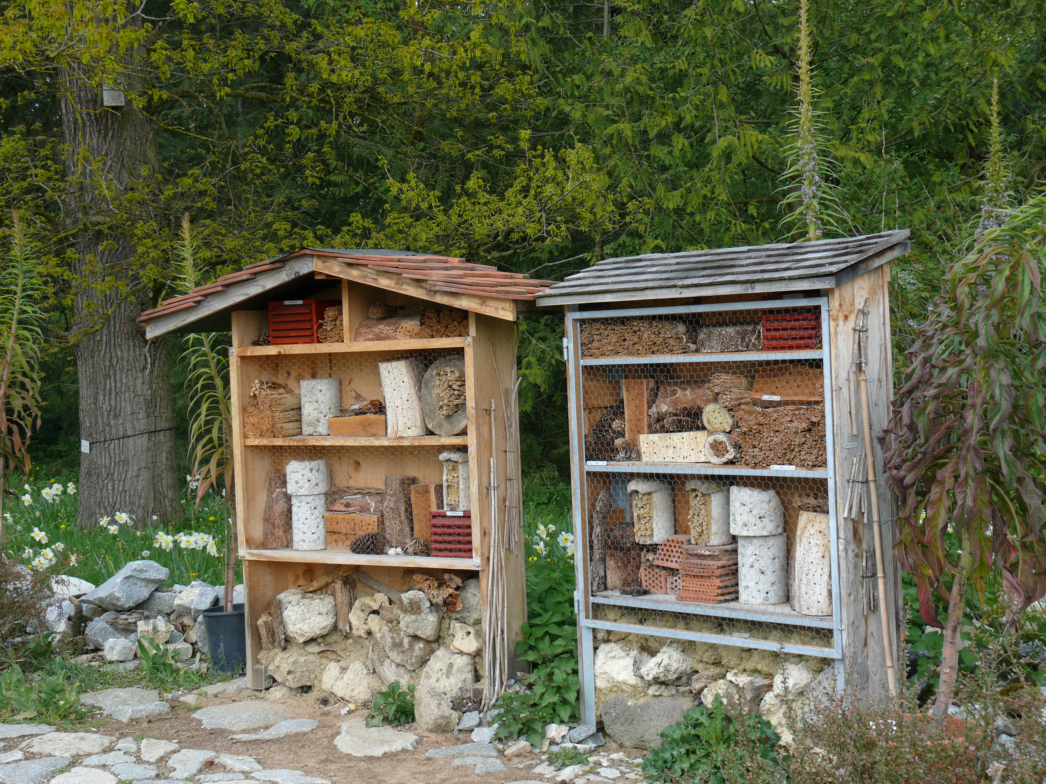 Zwei Insektennisthilfen im Botanischen Garten München Nymphenburg. Nistanlage mit Holzblöcken mit Löchern, Bündel von Schilfhalmen, Strangfalzziegel, Ziegel mit Löchern, Totholz, Lehmwände etc.